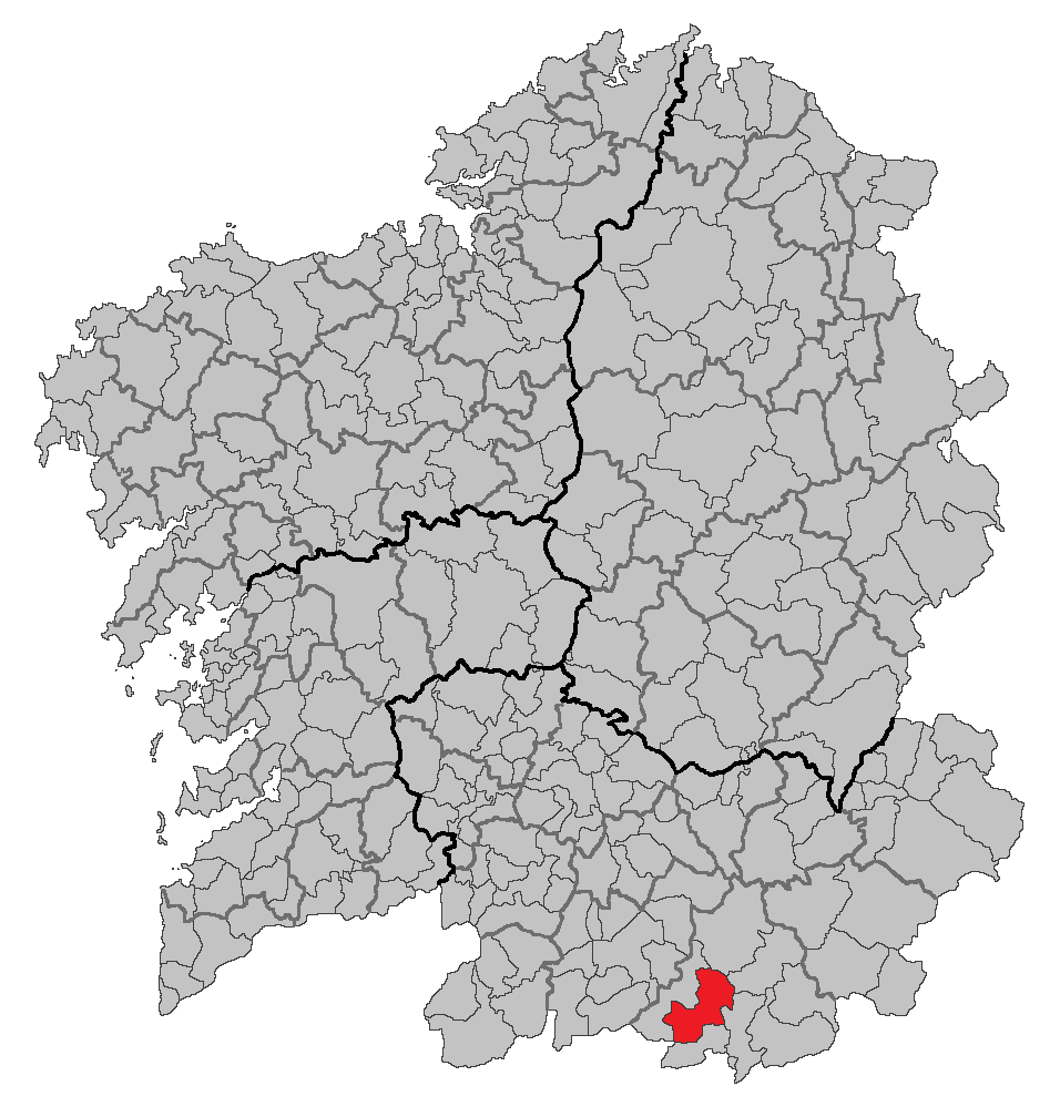 Mapa coa localización do concello de Monterrei.